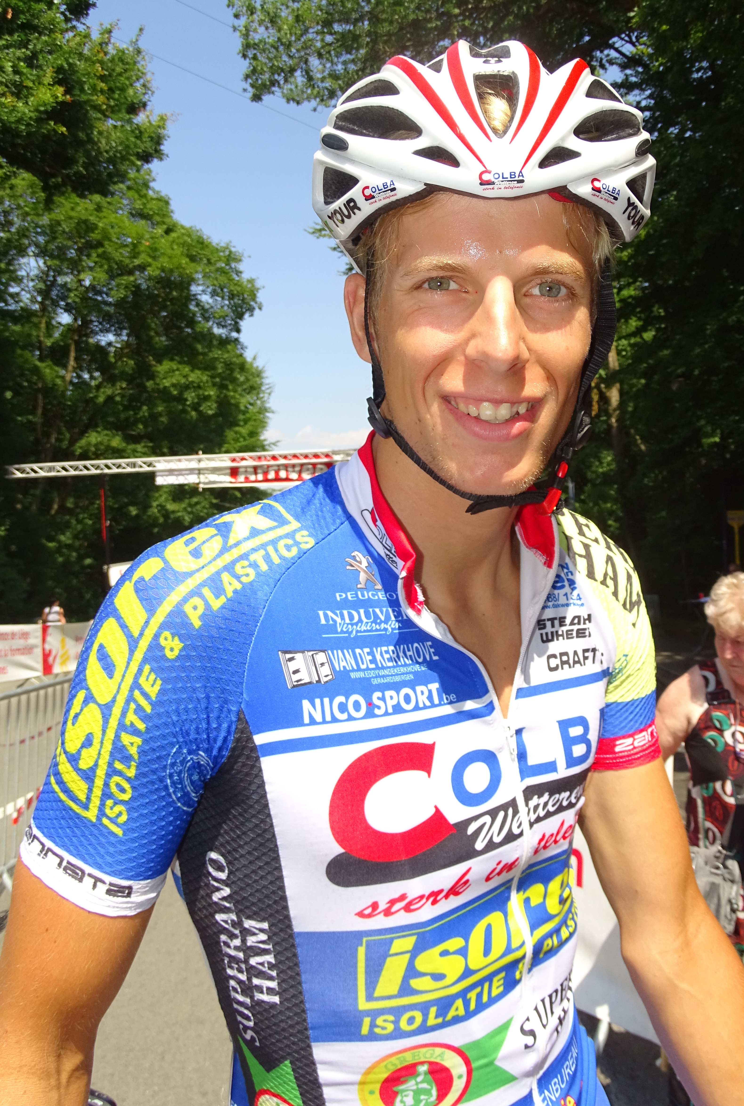 Reportage réalisé le vendredi 17 juillet à l'occasion du départ et de l'arrivée du Tour de la province de Liège 2015 à Ougrée (Seraing), Belgique.